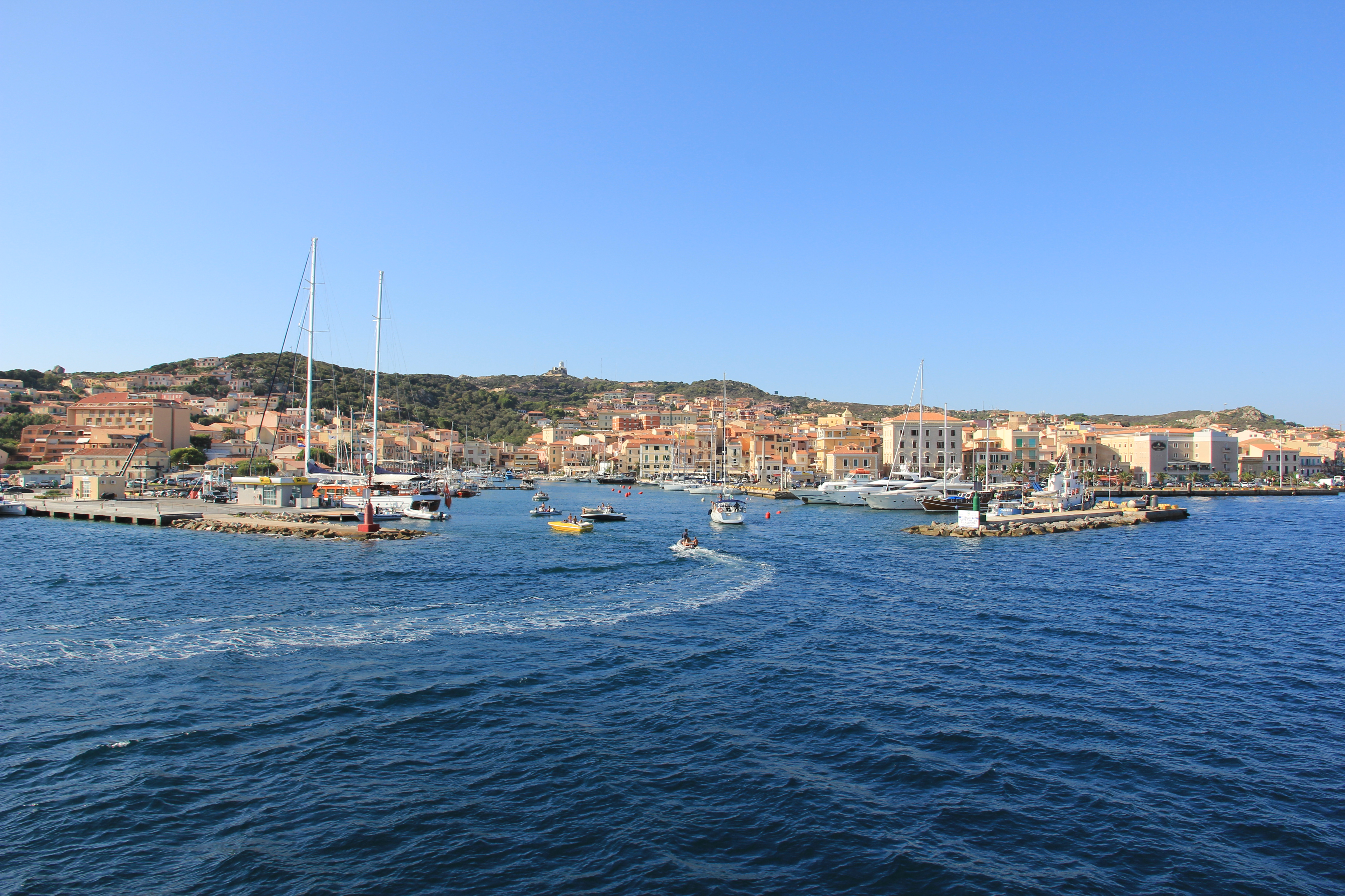 La Maddalena